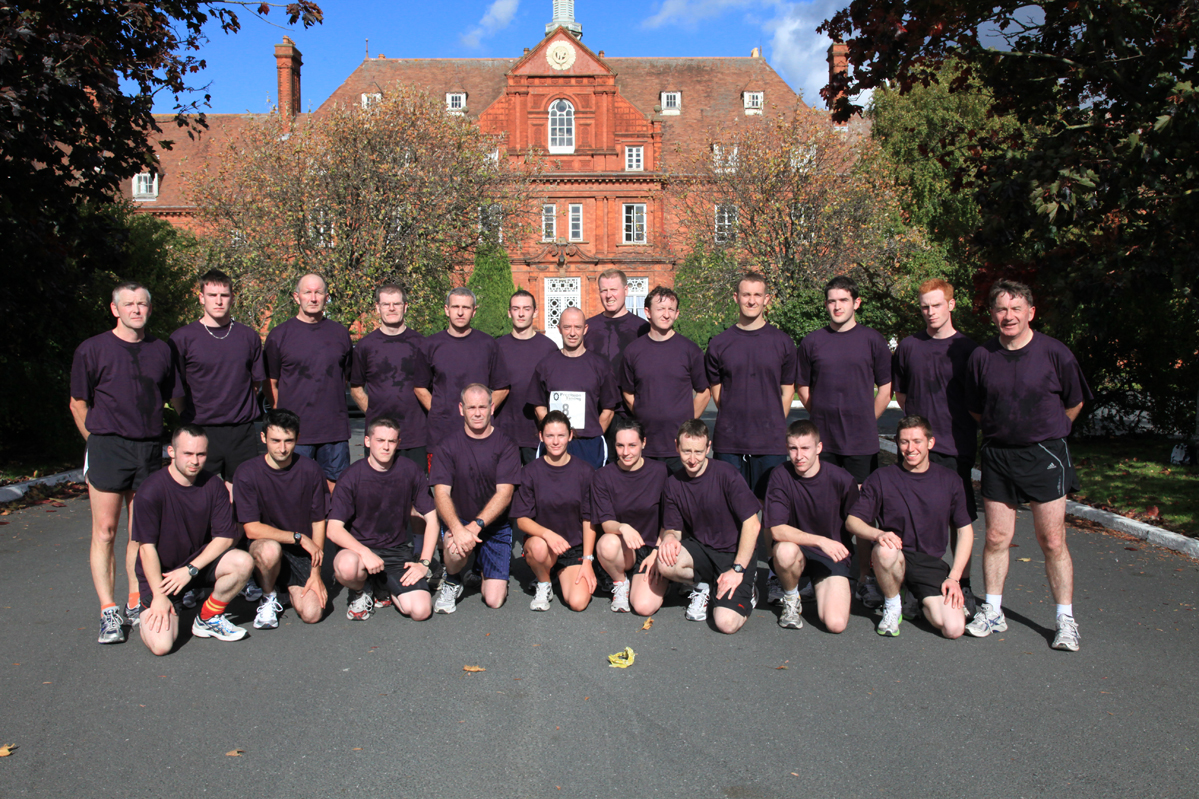 RDF Block Winners